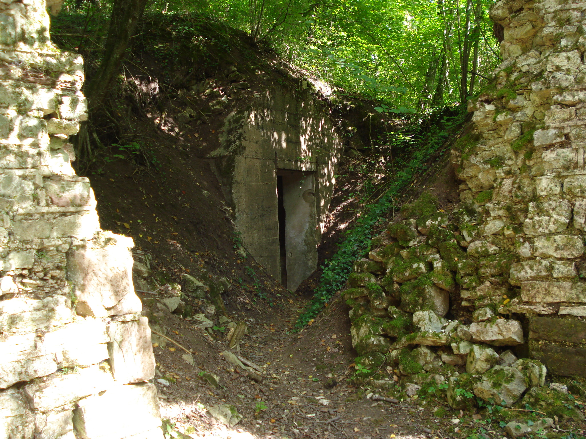 Hôpital chirurgical souterrain construit par l'Armée Française (brancardiers du 73ème régiment d’infanterie) à flanc de colline entre 1916 et 1918, desservi dès fin 1916 par une voie ferrée. Situé dans l'immédiat arrière front, il était destiné aux blessés jugés intransportables. Construction remarquable pour l'époque, l'ensemble du site a été classé monument historique en 1922. Aujourd’hui seules trois galeries perpendiculaires sont encore visibles, elles sont formées de tôles ondulées couvertes de béton puis d’une couche de terre. On en distingue encore bien les deux entrées mais l’ensemble de l’ouvrage comportait d’autres salles, notamment une salle d’opération, de radiographie, de pharmacie, un magasin, une cuisine … le tout alimenté par un groupe électrogène servant au chauffage, à la ventilation et à l’éclairage. En janvier 1918, l’ouvrage était terminé cependant il semble qu’il n’ait pas ou peu été utilisé.